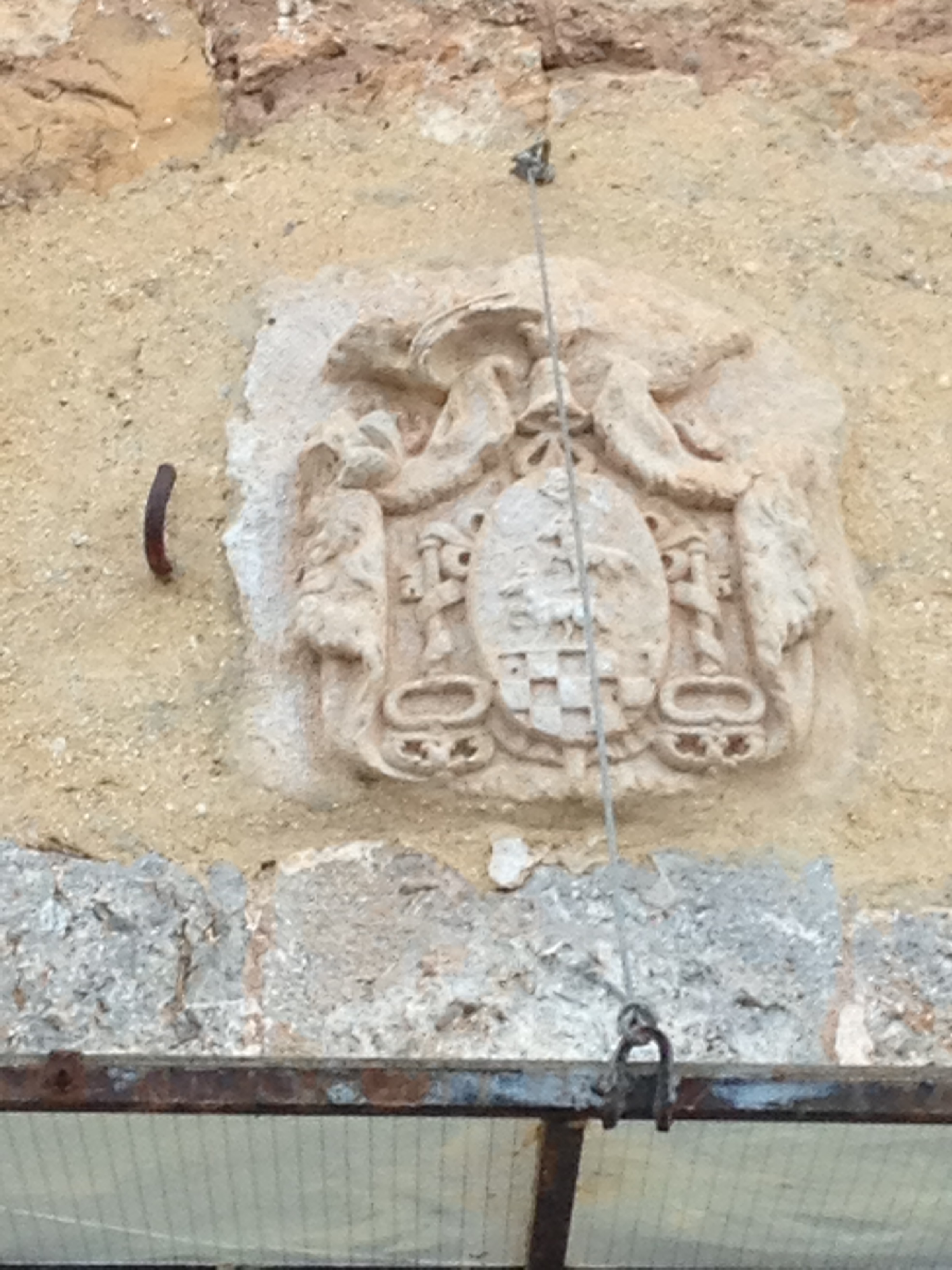 Escudo de Miguel de Múzquiz y Goyeneche (1719-1785), primer conde de Gausa.